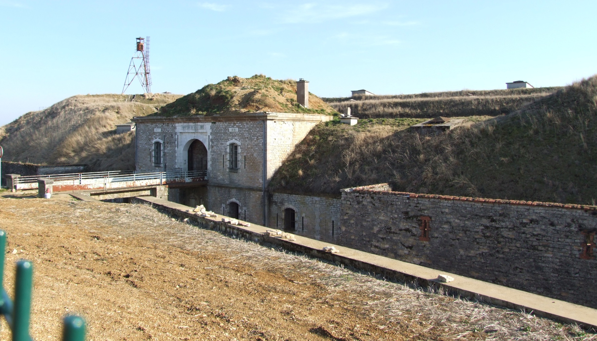 Entrée du fort de Beauregard. En arrière plan, une tour de guet. Fenay, Côte-d'Or, Bourgogne, FRANCE